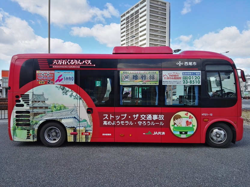 Rokumangoku-kururin bus